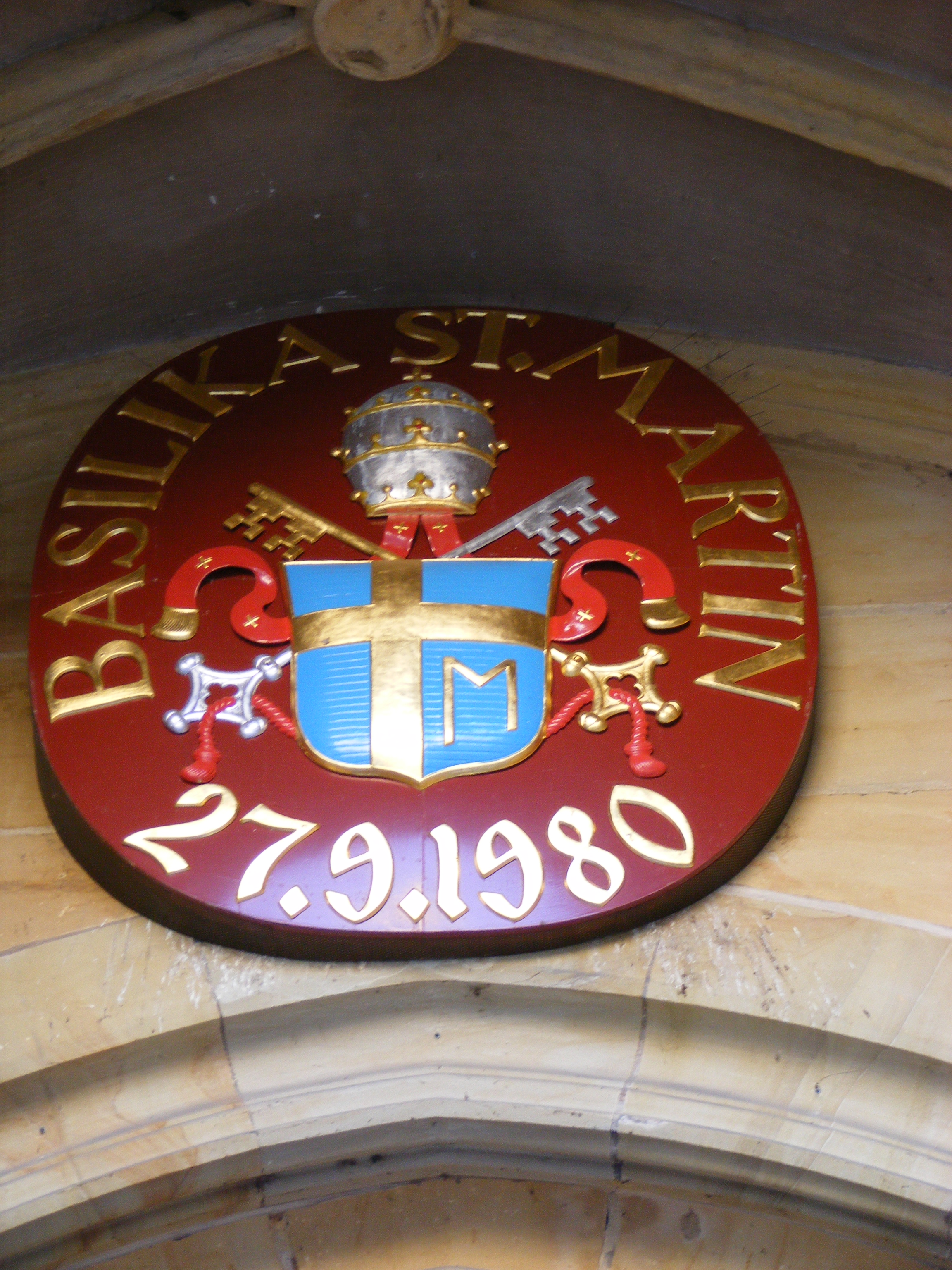 Amberg - Basilika St. Martin, Hauptportal: Wappen Joannes Paul II.